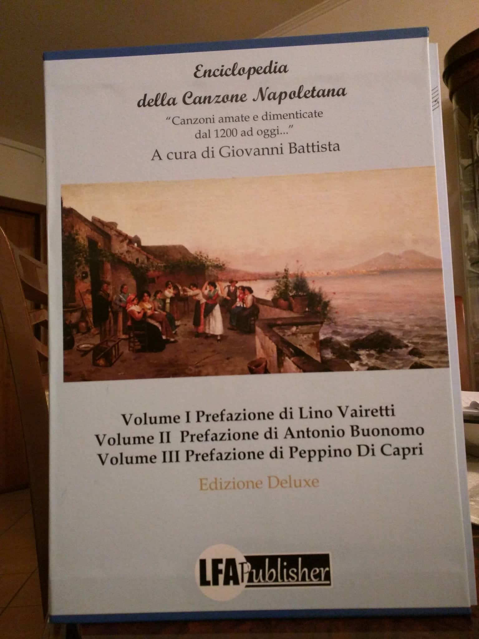 Il cofanetto contiene i tre Volumi della nuova Enciclopedia della Canzone Napoletana, editata dalla LFA Publsiher, 2018 e curata da Giovanni Battista